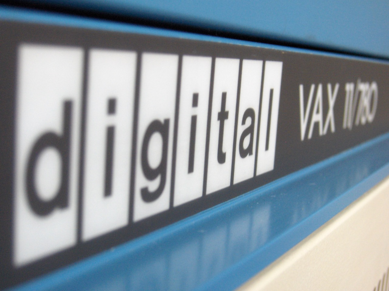 dettaglio dell'elaboratore Digital VAX 11/780